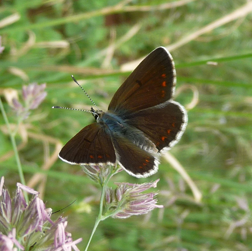 Aricia artaxerxes. Mountain Argus.